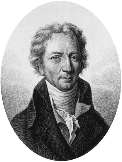 Dieudonné Sylvain Guy Tancrède de Dolomieu usually known as Déodat de Dolomieu (1750 - 1801)